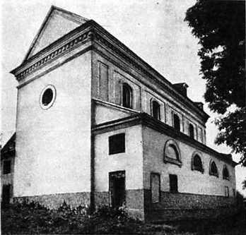 Zamiechów - kościół rzymskokatolicki pw. św. Jana Nepomucena, 1808-1820